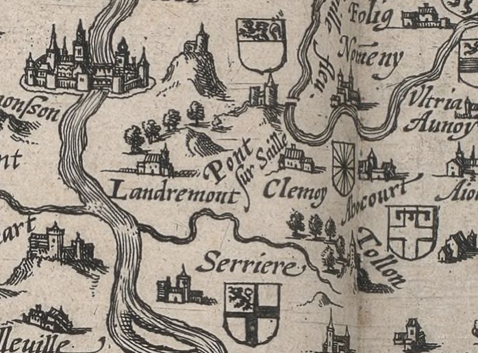 Extrait de la carte Description de la Haulte et Supérieure Lorraine dans le Volume X de la collection Gaston d'Orléans contenant la description du royaume de France, partie II